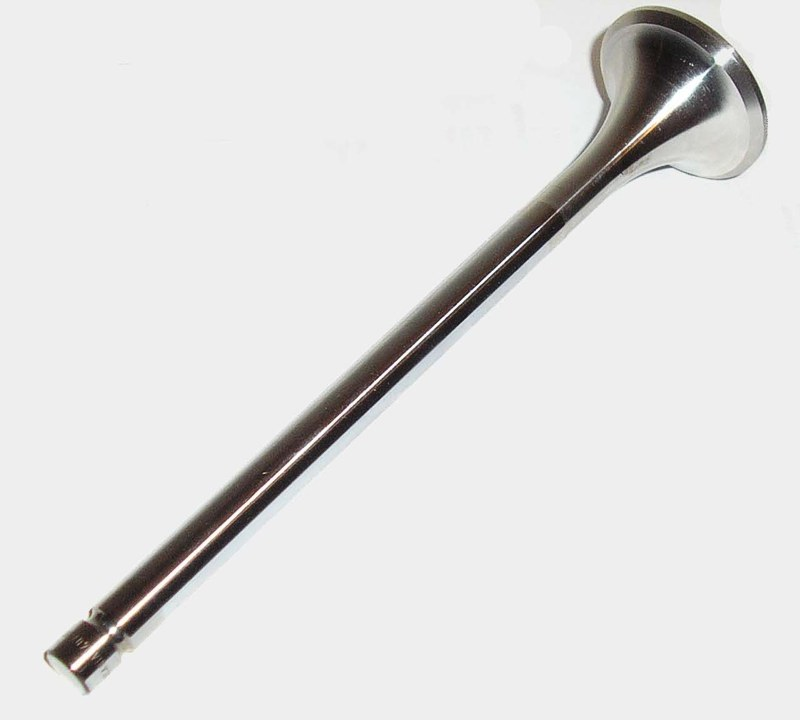 Motorventil. Bimetall- Ventil.